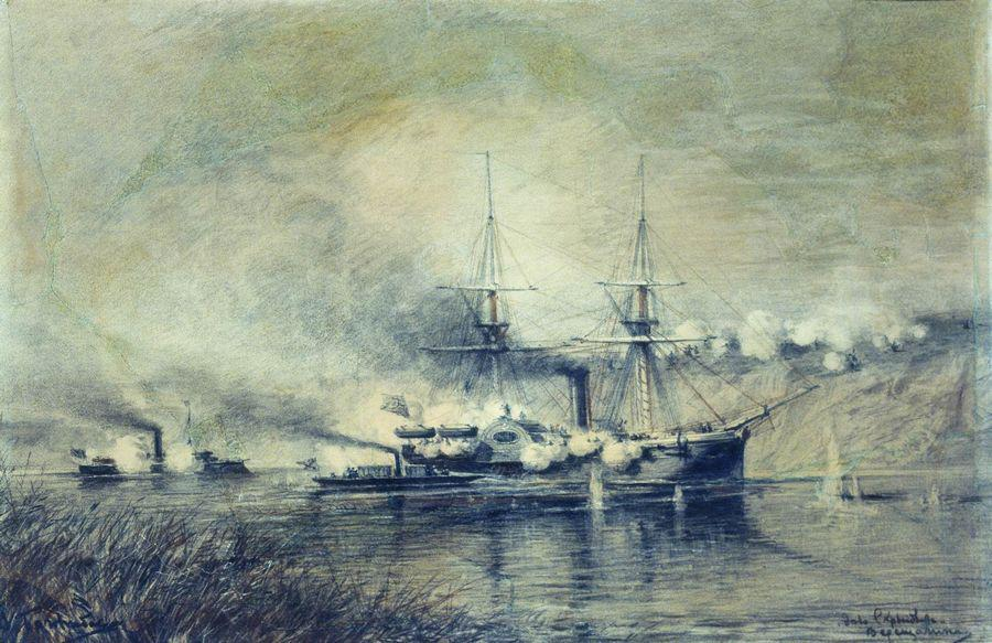 «Дело Скрыдлова.»title QS:P1476,ru:"Дело Скрыдлова." label QS:Lru,"Дело Скрыдлова."